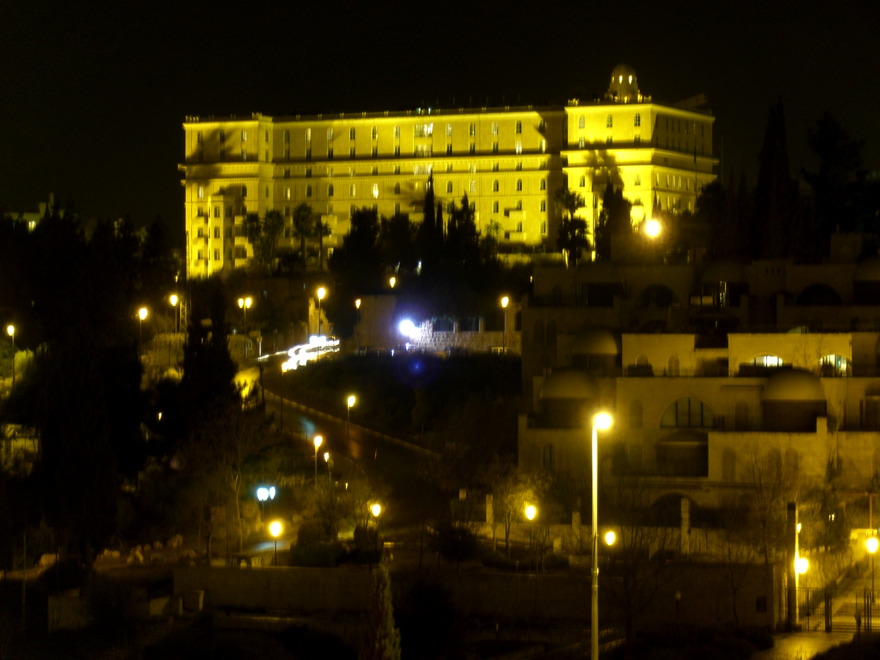 Das King-David-Hotel in Jerusalem von der Altstadt gesehen.